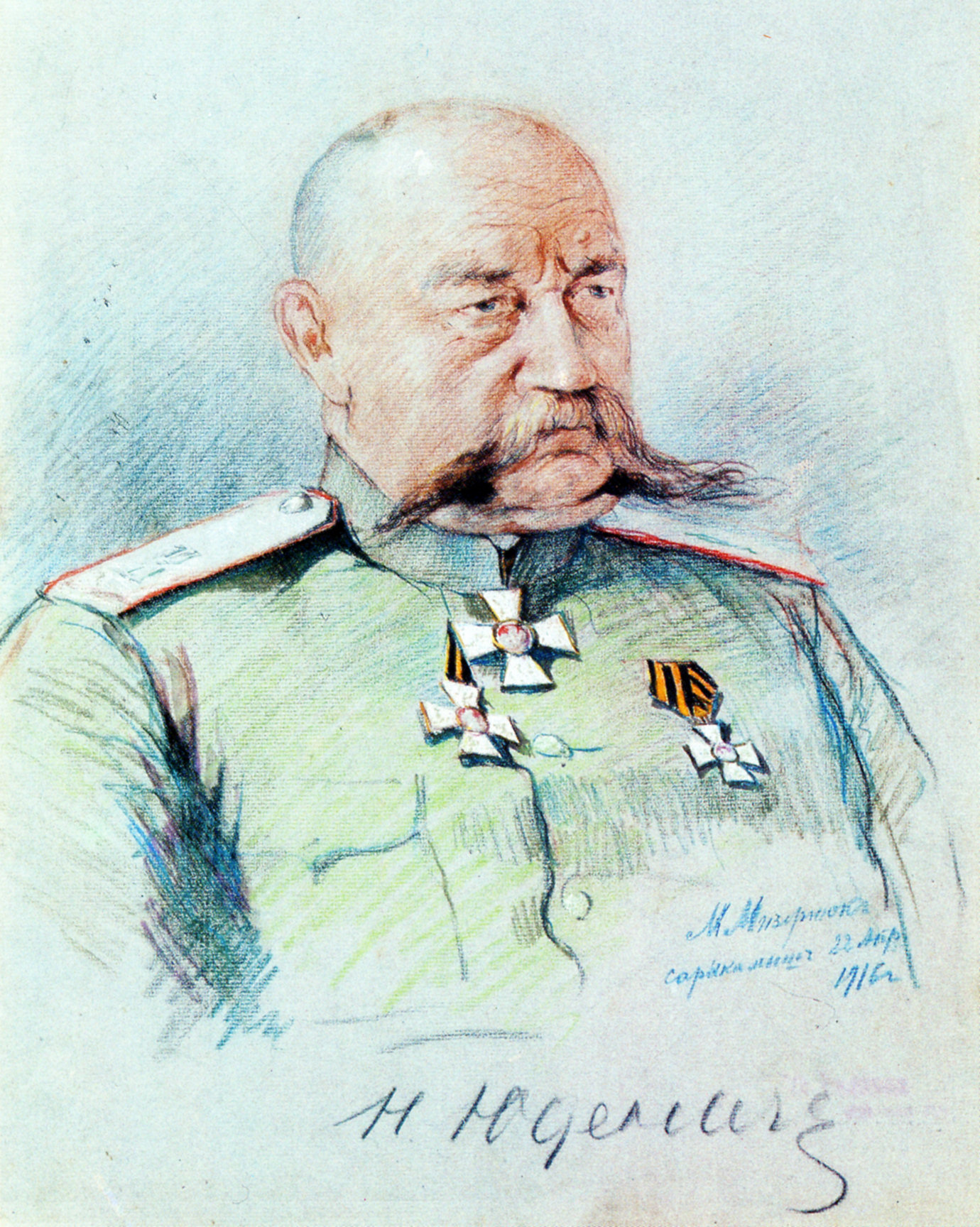 Портрет Н.Н. Юденича